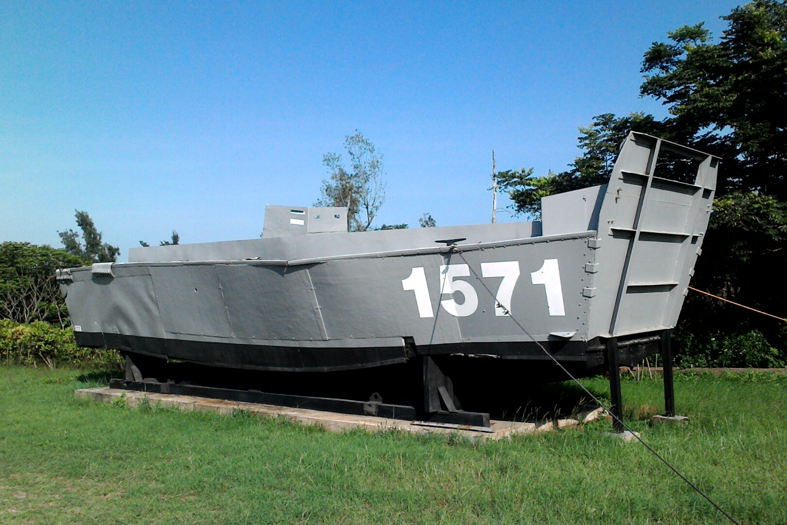 LCVP艇(人員登陸小艇),福建省金門縣金城鎮古城里